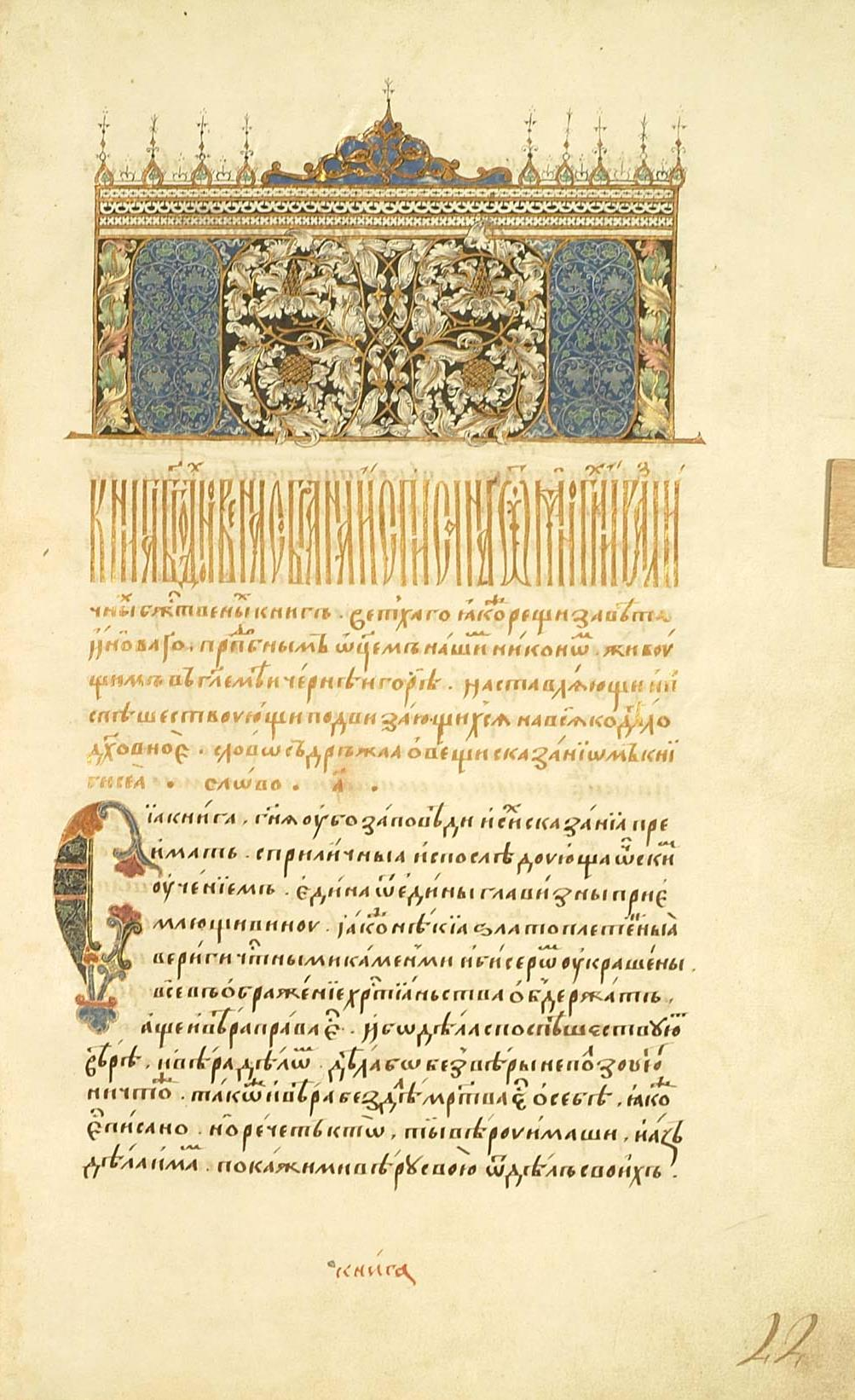 Рукопись № 56. Пандекты и Тактикон Никона Черногорца. Фонд 173.I. Фундаментальное собрание библиотеки МДА.